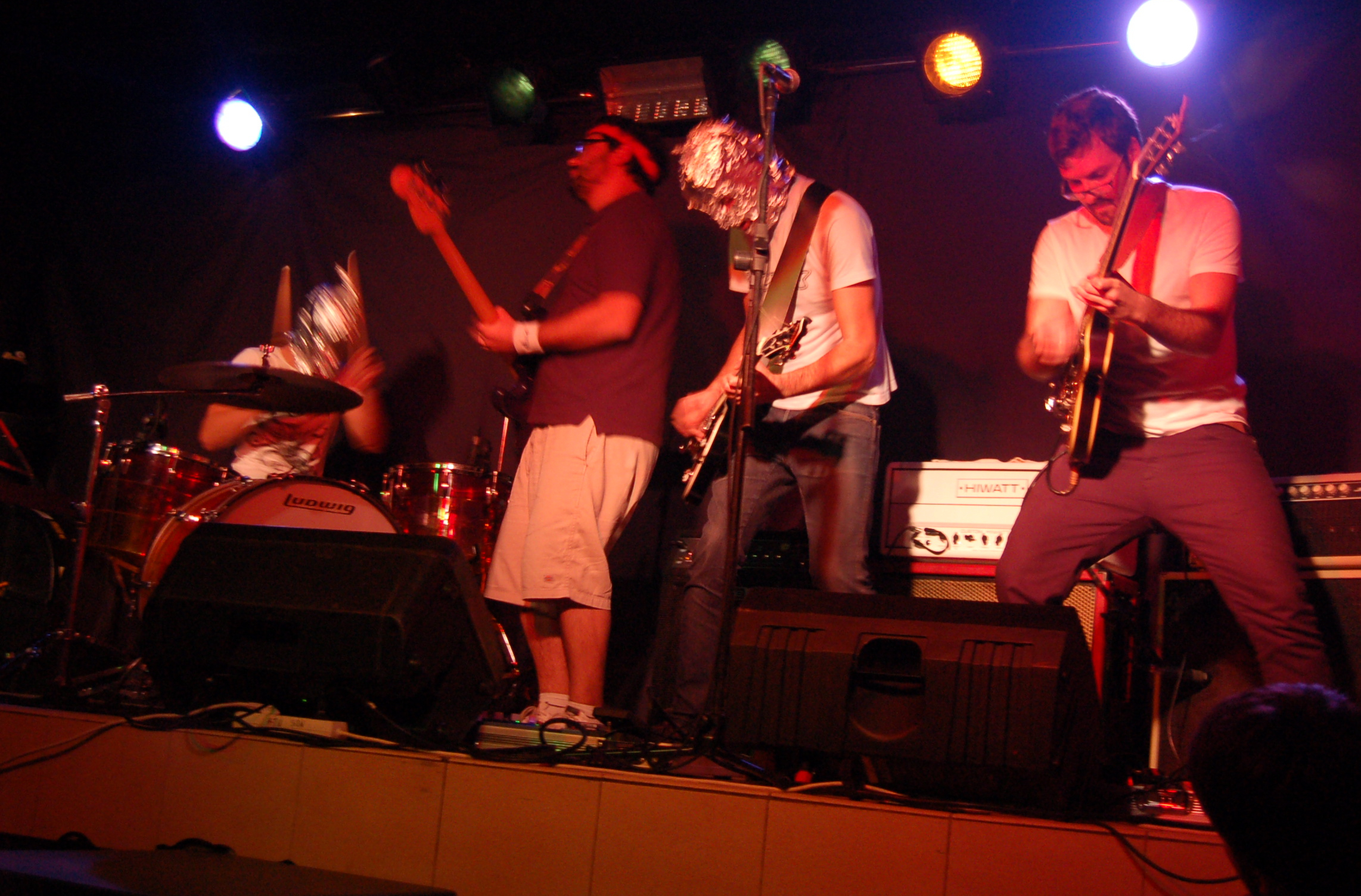 O grupo pontevedrés Unicornibot en concerto na Sala Karma